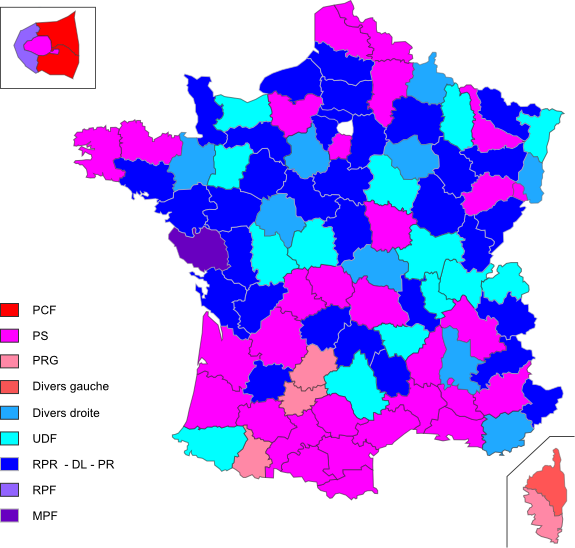 Appartenance politique des présidents de conseils généraux élus suite aux élections cantonales de 2001